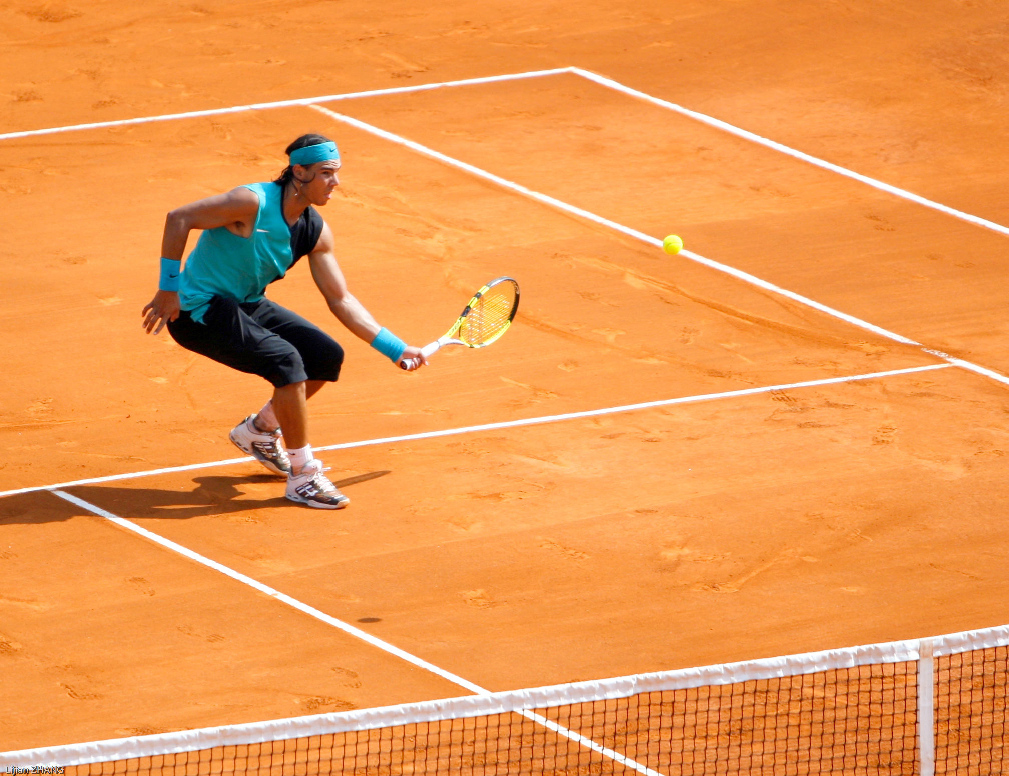 Rafael Nadal, Master Series Monte Carlo 2007